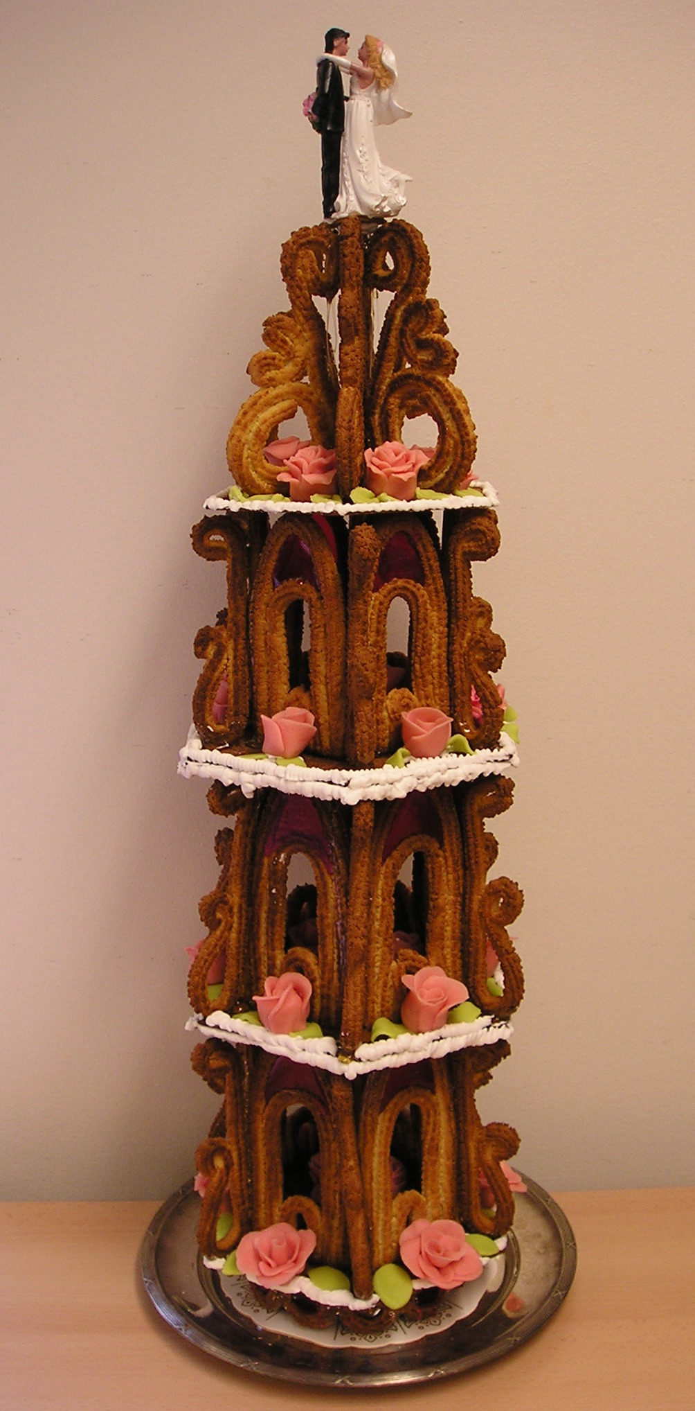 Bild på Krokan